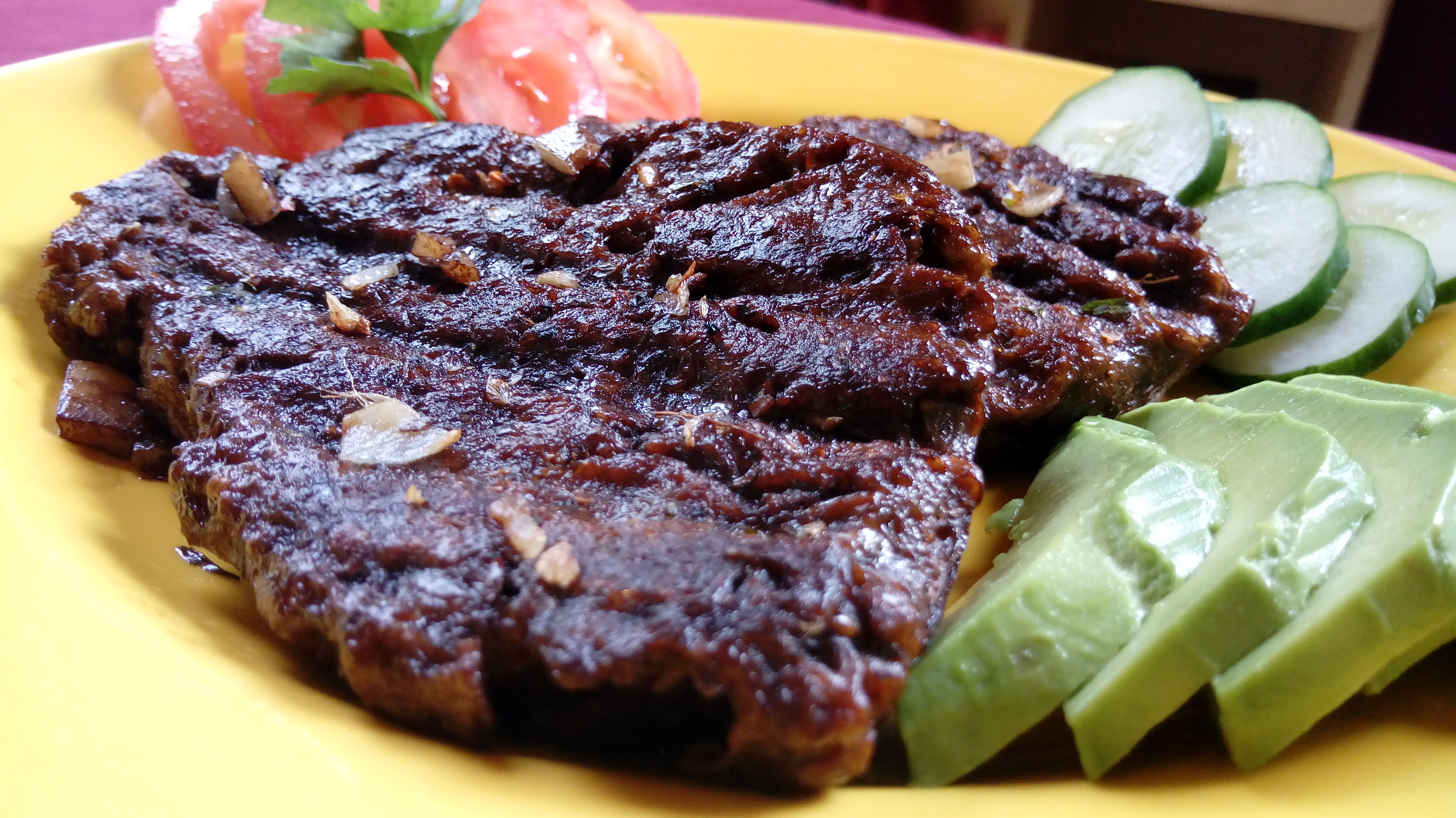 bifes de seitán con ensaladas